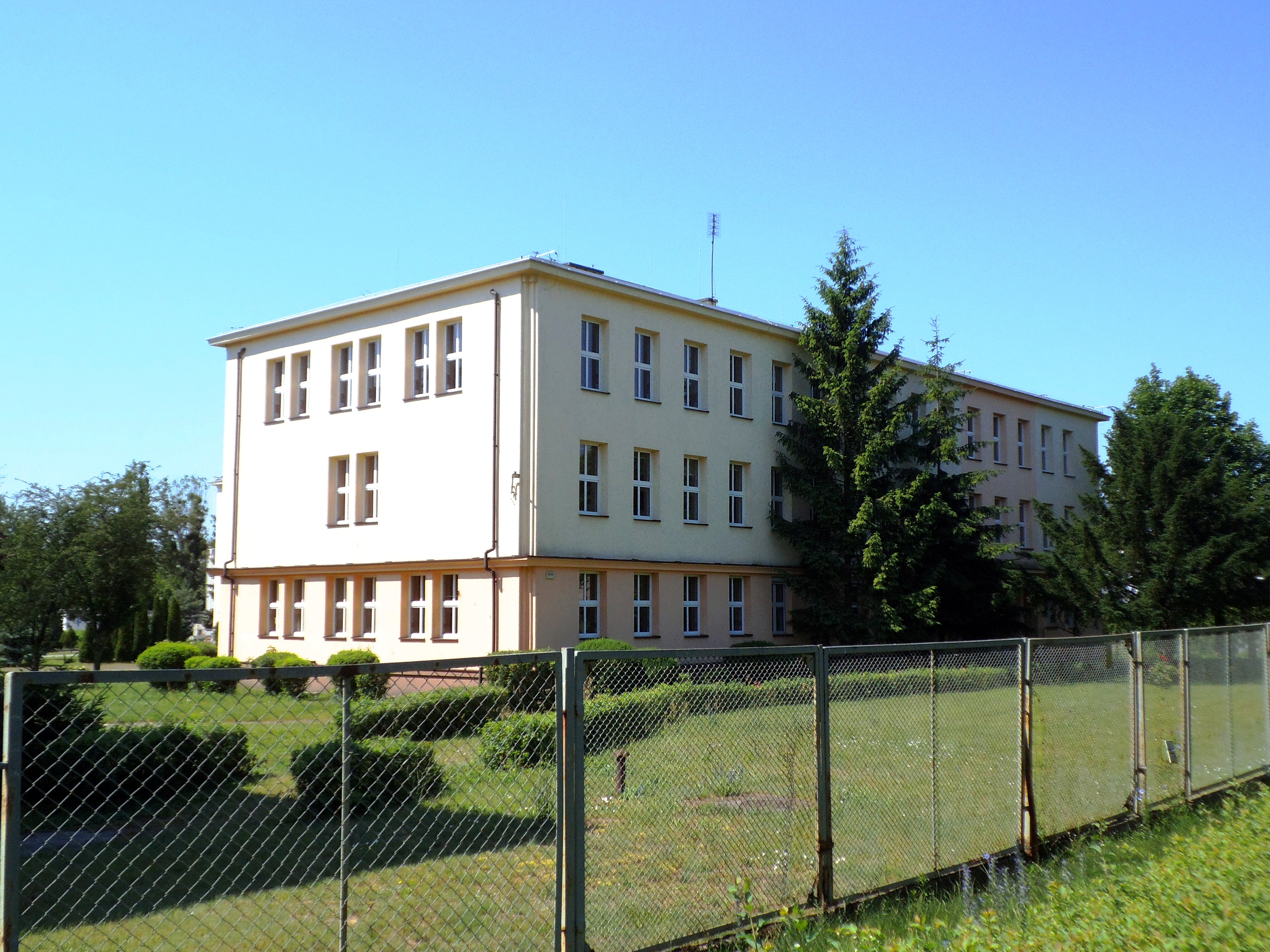 Zespół Szkół Przemysłu Spożywczego w Toruniu1